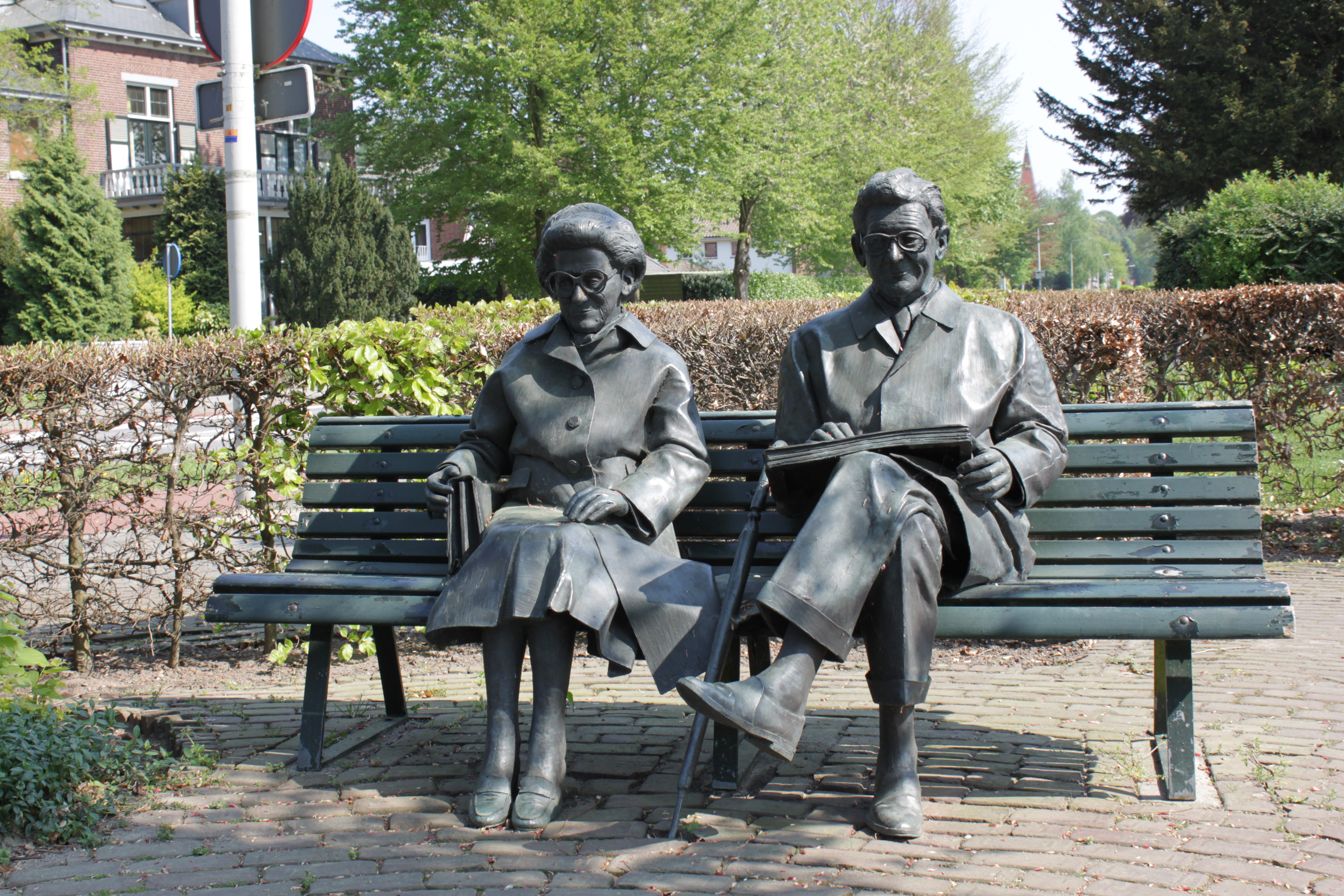 Beeld van Simon Carmiggelt en echtgenote Tiny, tegenover het gemeentehuis van gemeente Rheden: Hoofdstraat in De Steeg. Naast het beeld staat een plaquette met daarop de tekst: Beeld van Simon Carmiggelt en echtgenote Tiny. In brons vereeuwigd door de Rhedense kunstenaar Wim Kuyl. De auteur Carmiggelt (1913-1987) schetste in zijn humoristische, melancholieke kronkels (dagelijkse columns in Het Parool) de dingen om hem heen. Simon en Tiny Carmiggelt beschouwden De Steeg als hun tweede thuis. Het beeld, tot stand gekomen door giften van de gemeente Rheden en het Cultuurfonds bouwfonds Nederlandse Gemeenten is 15 juni 1990 onthuld door Tiny Carmiggelt. Op 22 januari 2012 bleek dat dit beeld gestolen was. Op 25 januari werd het in schuren in de buurt teruggevonden, in ongeveer 100 stukken gezaagd.